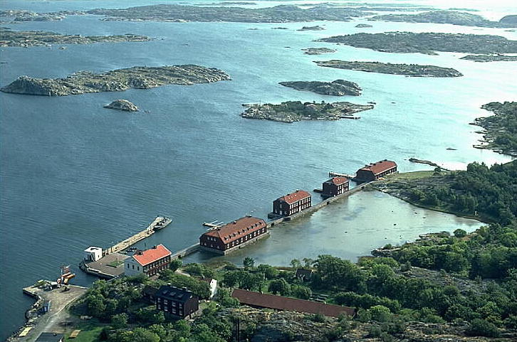 Känsö före detta karantänsanstalt Motiv: Stora Känsö Nyckelord: Byggnadsminnen:Statl, Flygbilder, Riksintressen Kategori: Karantänsanstalt Känsö före detta karantänsanstalt.